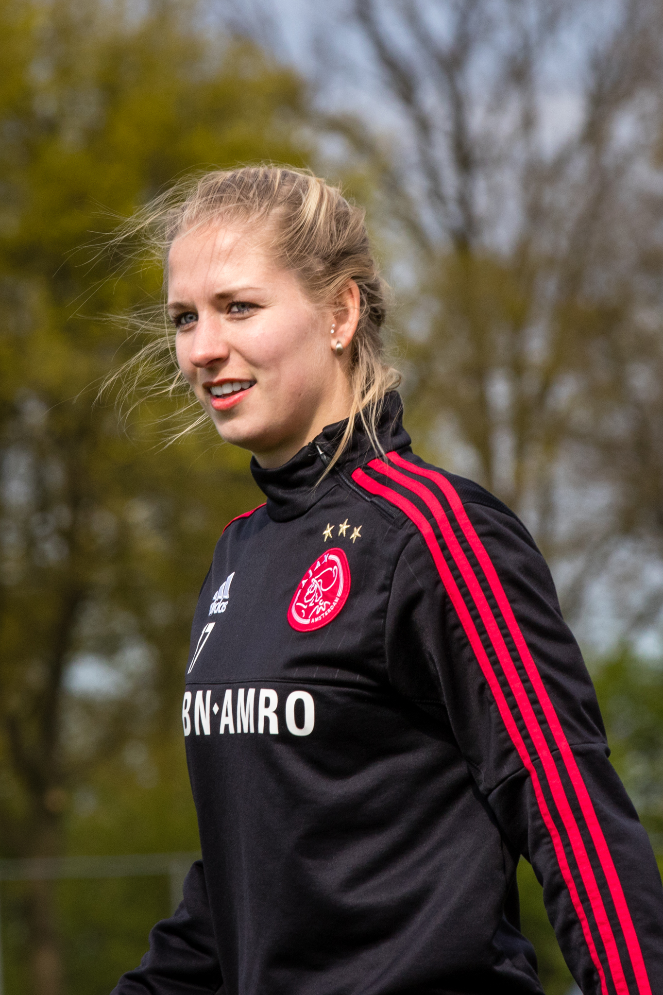 Kelly Zeeman tijdens een clinic van Ajax Vrouwen voor de jeugd van Longa '30 in Lichtenvoorde